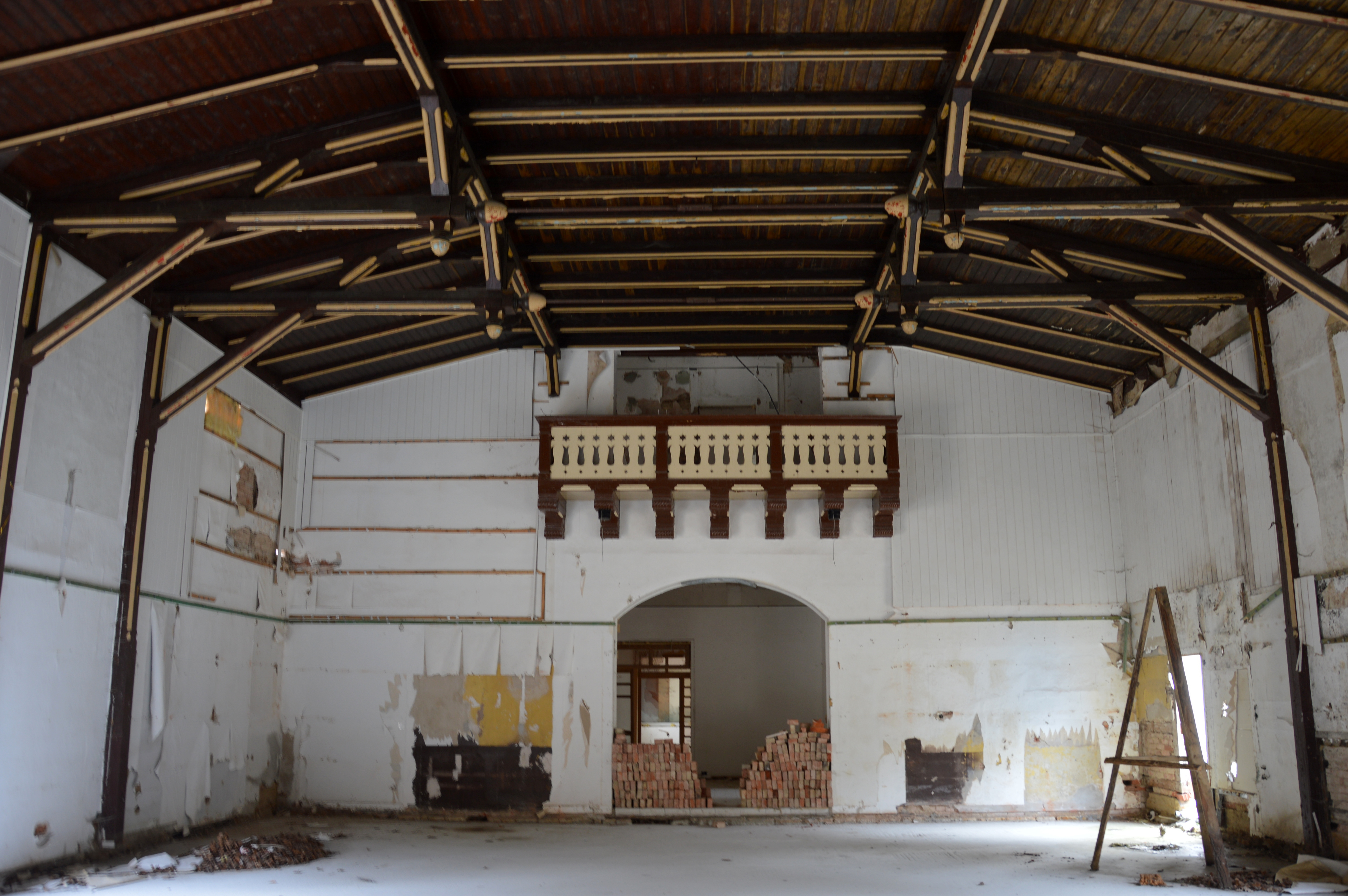 Hubertuhöhe Blick durch den Saal